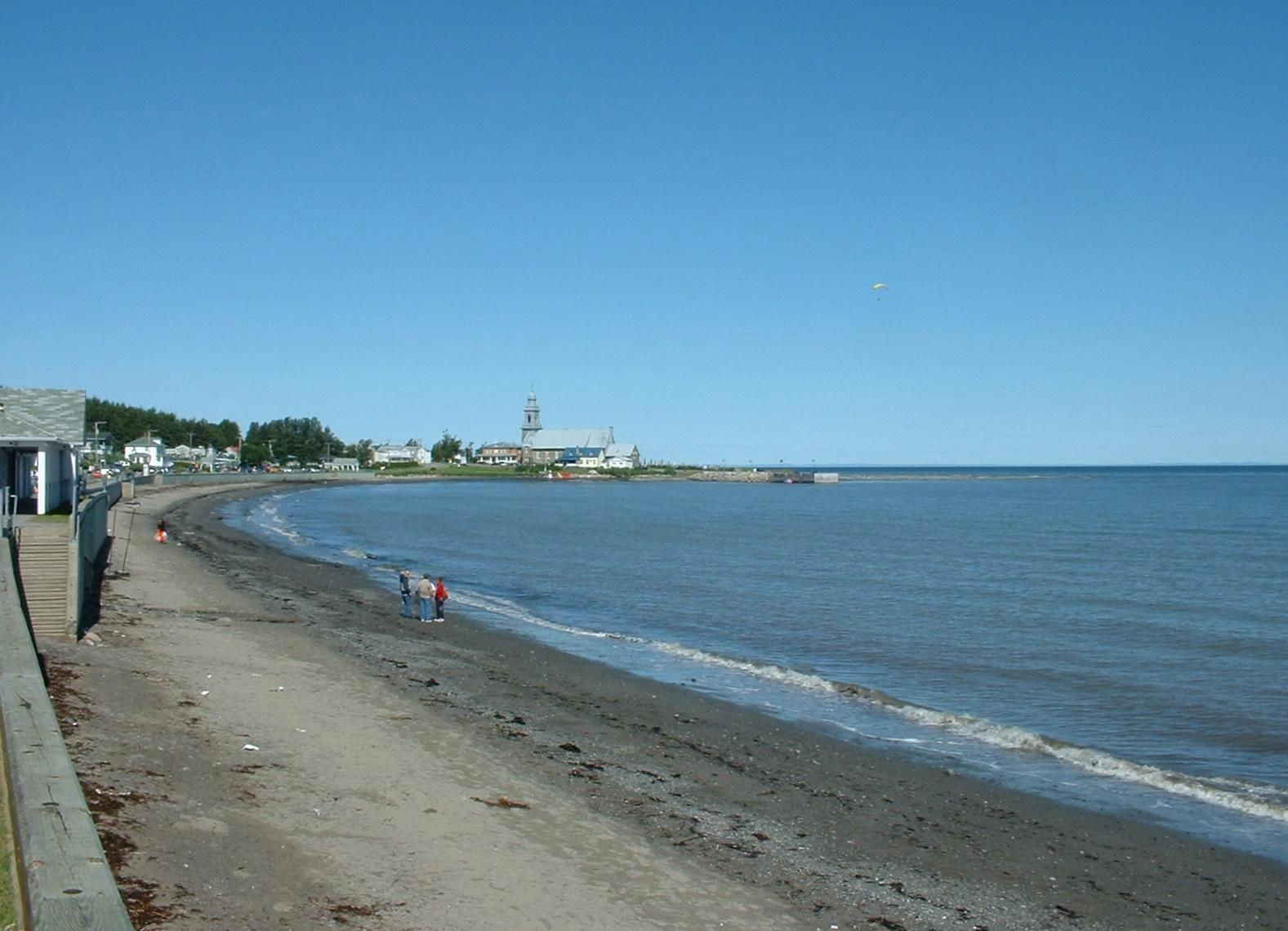 Anse aux Coques - Sainte-Luce, Québec